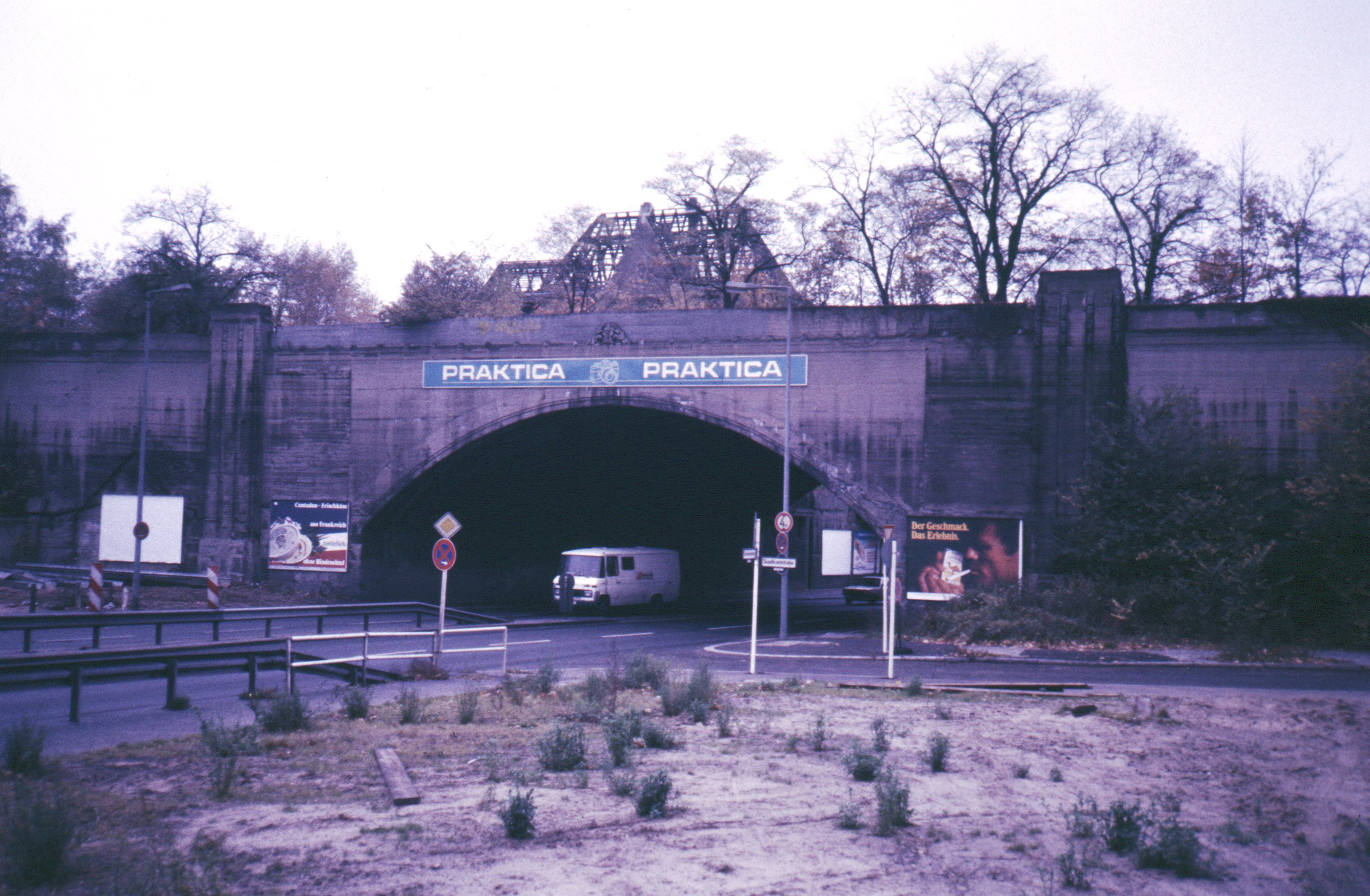 Sachsendamm Berlin